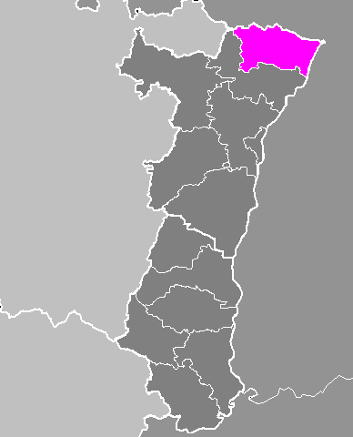 Maps of arrondissements and cantons of France: Arrondissement de Wissembourg.PNG (Région Alsace)